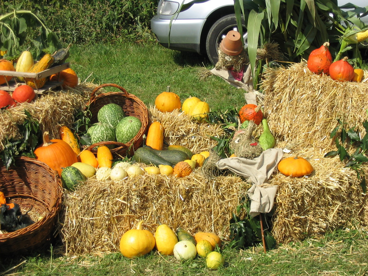 Kuerbistfest Raning/Stmk.